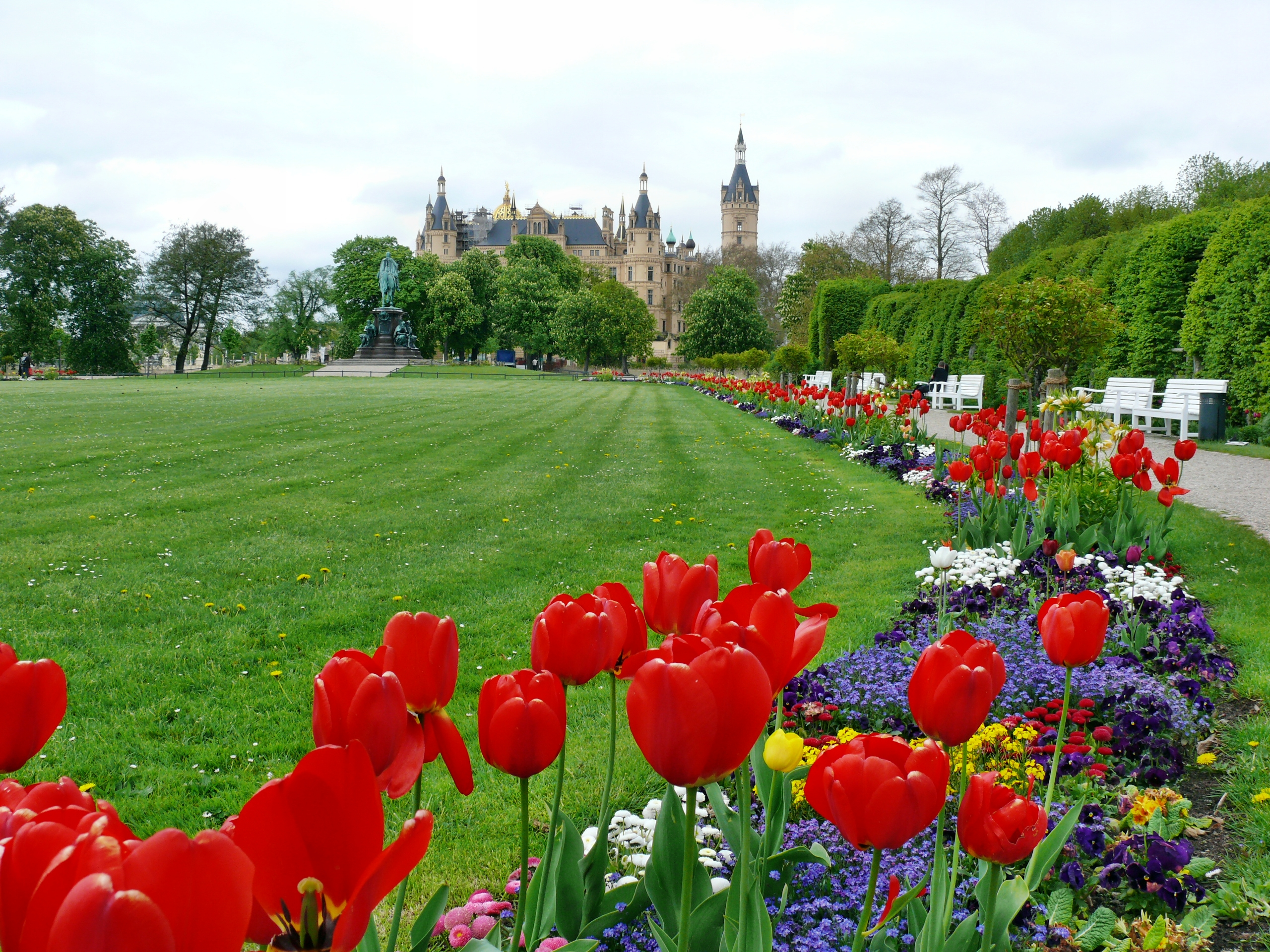 Frühling im Schlosspark